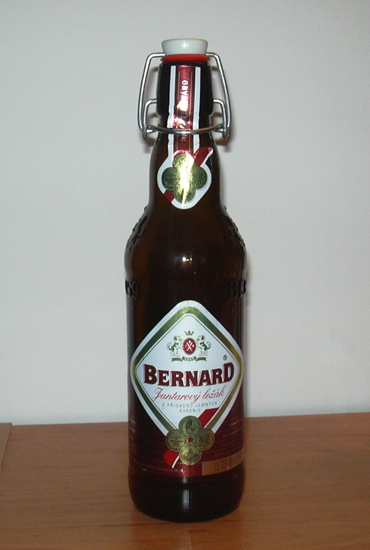 Bernard jantarový ležák (Beer- czech republic)